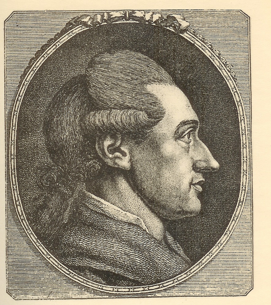 Anonyme Kupfervignette nach einer Zeichnung von Georg Friedrich Schmoll von 1774, Johann Wolfgang Goethe im grauen Kaputkragen mit Haarband im Profil nach rechts darstellend